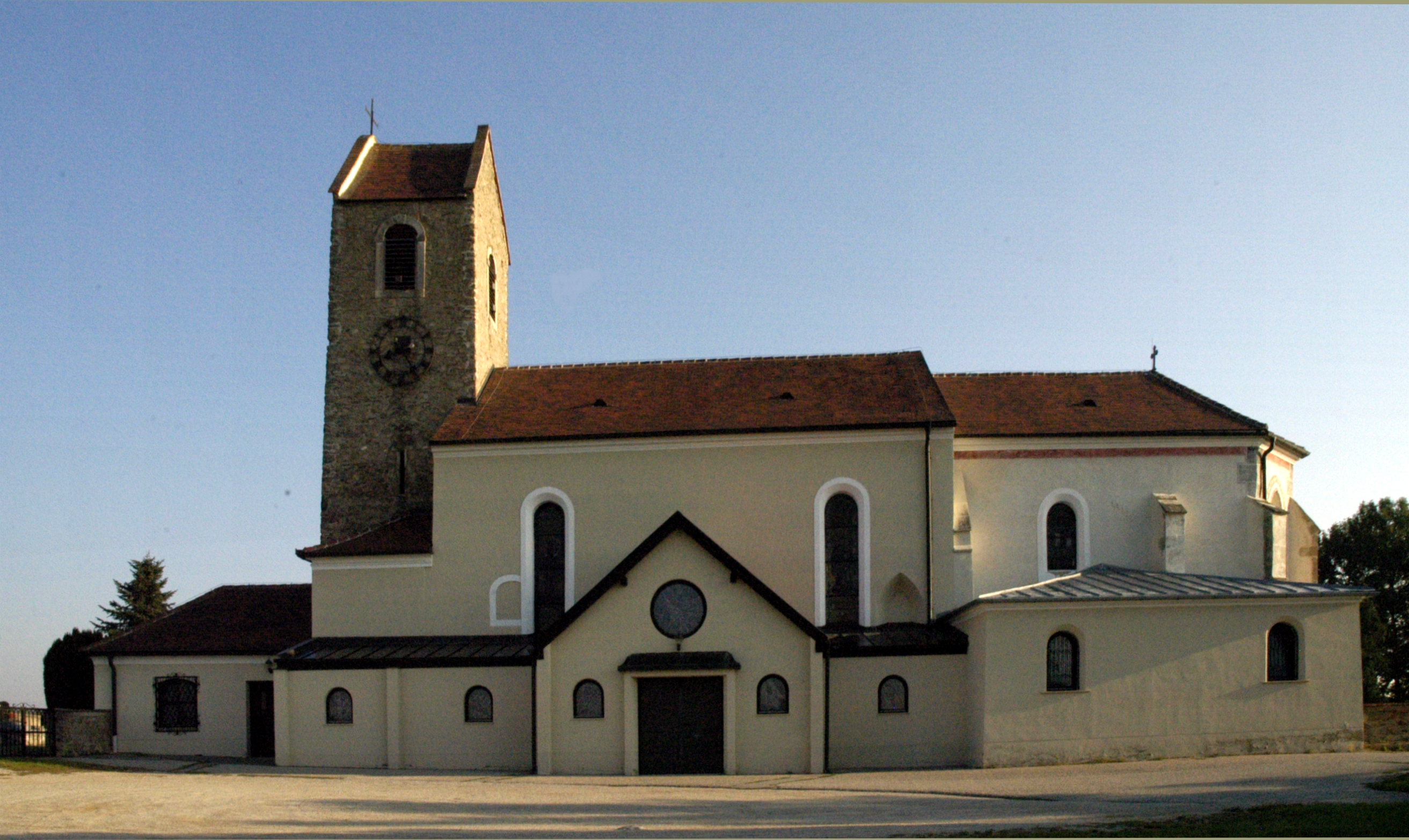 katholische Pfarrkirche heiliger Michael in Hohenwarth, Gemeinde Huhenwarth-Mühlbach am Manhartsberg